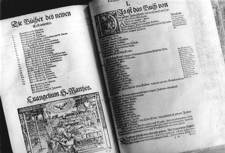 Dresden, Bibeldruck von Hans Lufft ADN-ZB Häßler 12.5.88 Dresden: Aus dem Jahre 1567 stammt diese Bibel. Sie wurde von Hans Lufft, dem Drucker Martin Luthers, hergestellt und gehört zu den Kostbarkeiten der Sächsischen Hauptbibelgesellschaft Dresden. Dort werden ständig Ausstellungen für Kirchen der DDR zusammengestellt, die einen Überblick über die Geschichte der Bibel von den Ursprüngen bis zur Gegenwart vermitteln. Die Gesellschaft besitzt u.a. Bibeln aus China und von nordamerikanischen Indianern sowie Ausgaben in Stenografie und Blindenschrift. (siehe 6 und 8 N)